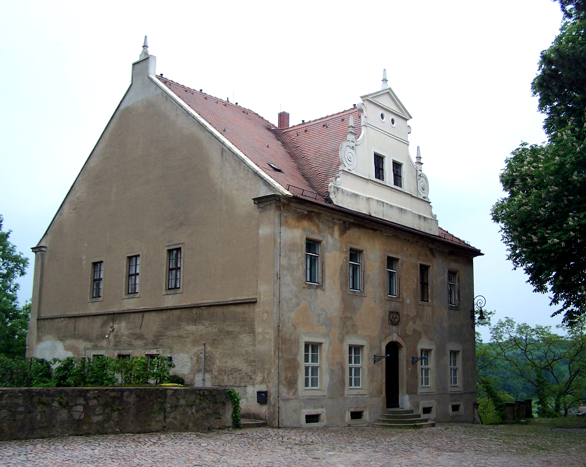 Nebengebäude Schloss Schieritz, Gemeinde Diera-Zehren, Landkreis Meißen